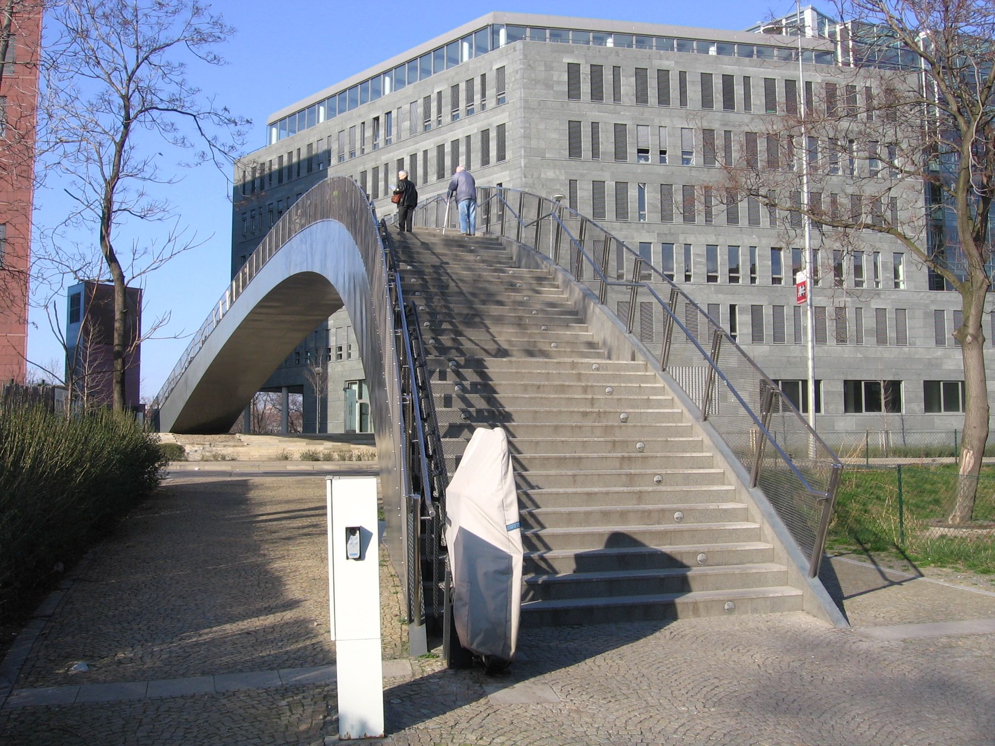 Lávka Rohanské nábřeží